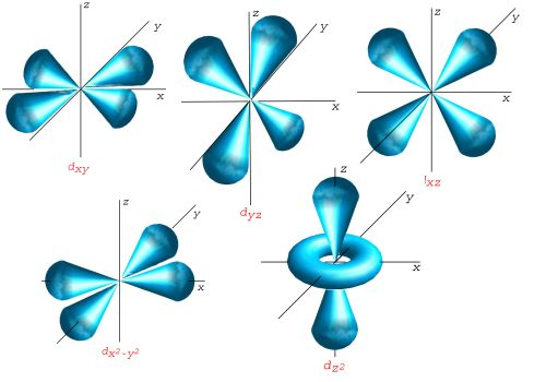 Zeichnung d-Orbitale